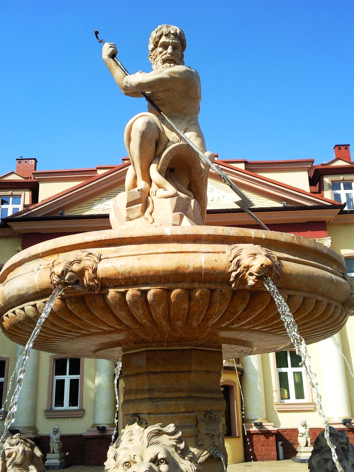 Pałac zlokalizowany w Czeladzi przy ul. Dehnelów 2 jest okazałym, neoklasycznym obiektem. Szczególną uwagę przyciąga rozbudowany portyk. Wsparty na czterech jońskich półkolumnach tympanon wypełnia symbol kopalni – planeta Saturn. Nad półokrągłym balkonem znajduje się znacznych wymiarów zegar zwieńczony postaciami górników. W klucz nadokiennego łuku wpisana jest tarcza ze stylizowaną literą „S”. Budynek wybudowany został około roku 1910, choć pierwotnie był znacznie mniejszy (przebudowano go w latach 1922 – 1923) i jak pisał w latach trzydziestych Marian Kantor – Mirski „nie mający równego w całem Zagłębiu”. Obiekt ten, o niezwykle intrygujących założeniach architektonicznych, do dziś budzi podziw swą wyjątkową bryłą. Obok budynku rozciąga się park. Założony został na początku naszego stulecia na podstawie projektu S. Cielichowskiego. Zajmuje powierzchnię 1 hektara. Układ komunikacyjny parku został całkowicie zatarty, a większa część założenia wraz z zielenią zniszczona. Dziś, dzięki staraniom obecnego właściciela, obiekt powrócił do dawnej świetności. Wykonano renowację oraz podświetlenie zabytkowej fasady. Niezwykłego charakteru dodaje obiektowi również stylowa fontanna, która umieszczona została przed wejściem głównym do obiektu. Samego wejścia pilnują dwa potężne lwy wsparte o symboliczne 'S'. Również nowy parking jak i nowo wybrukowany podjazd przed budynek uatrakcyjniły obiekt. Obecnie Pałac łączy w sobie funkcję Centrum Konferncyjnego, luksusowych Apartamenów, Centrum Biznesu oraz unikalnego kompleksu Term Rzymskich - Świątyni Zdrowia i Energii.